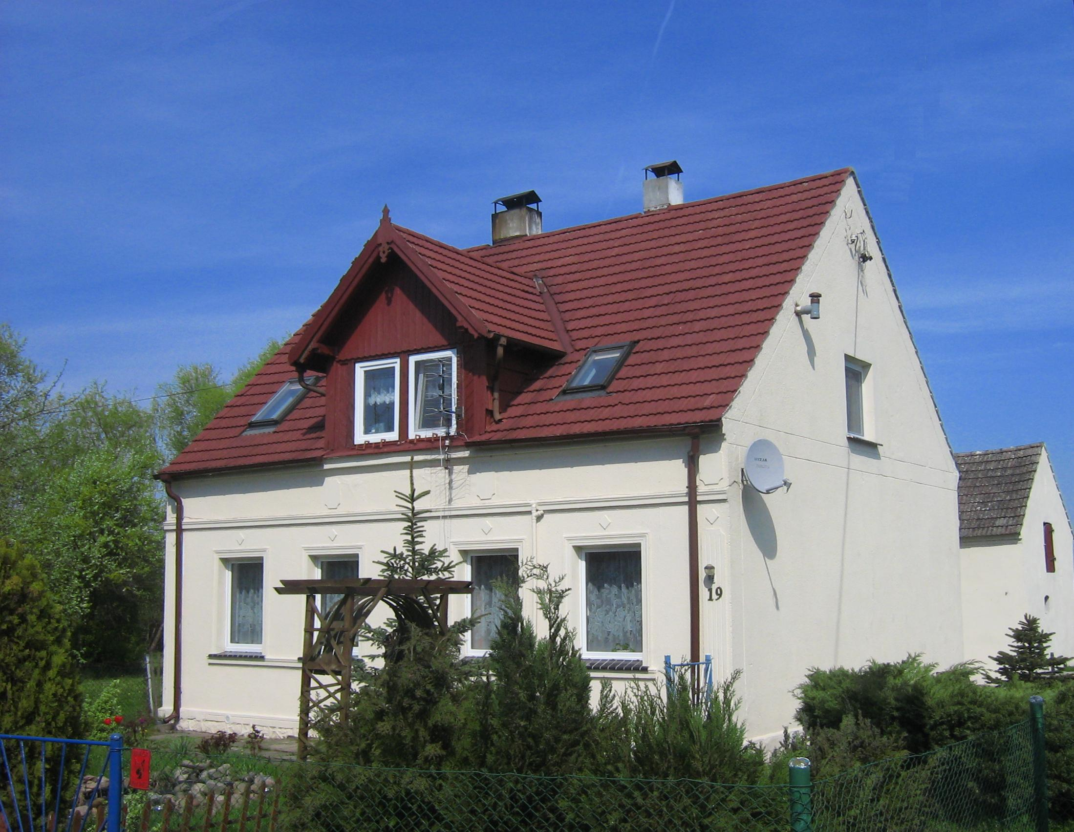 Dom z numerem "19" w Sierosławiu